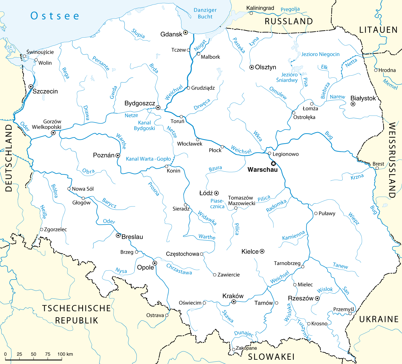 Flüsse in Polen (Karte)